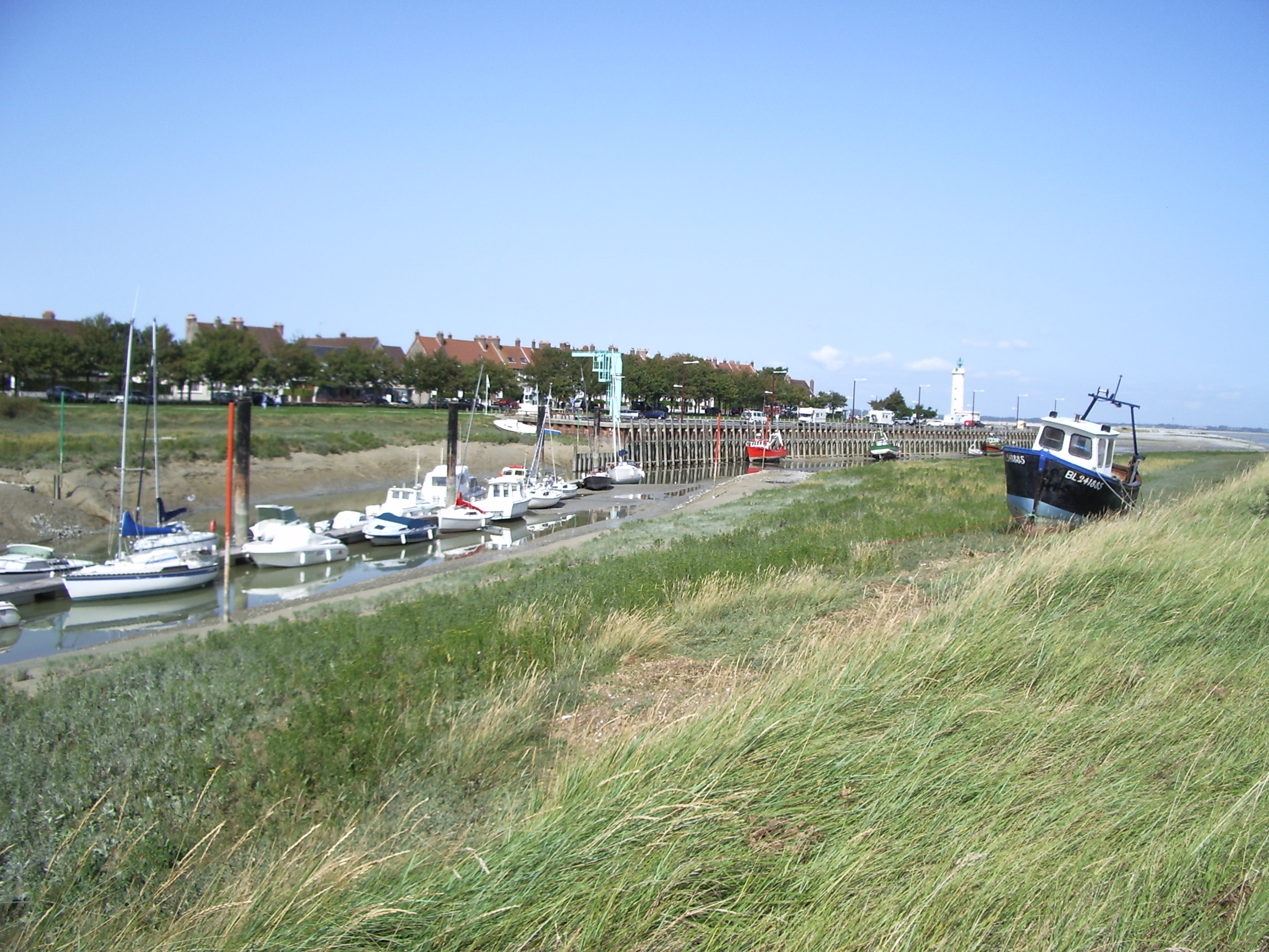 Le port.